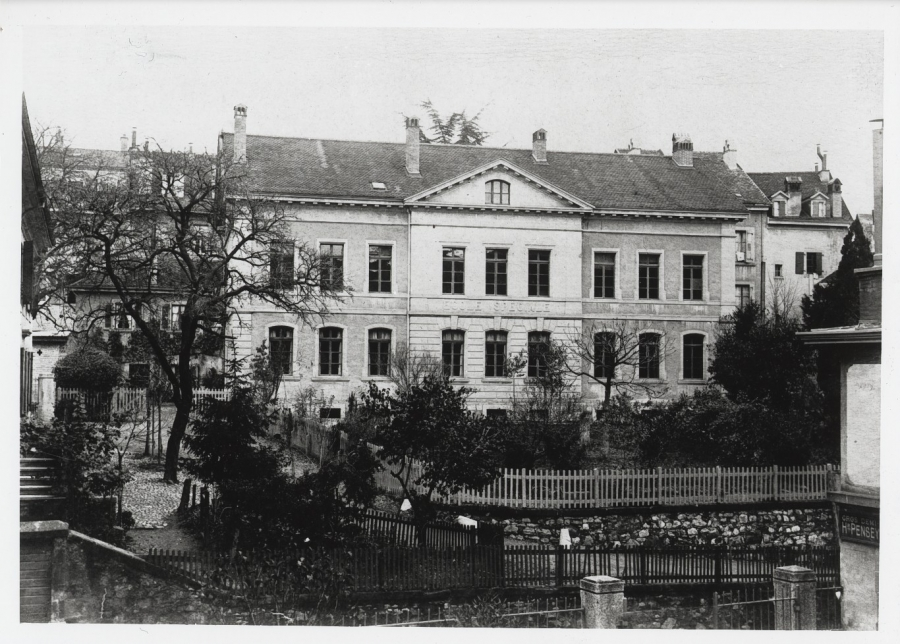 École spéciale de Lausanne, créée en 1857, rue de la Tour 8. Elle deviendra l'École polytechnique fédérale de Lausanne (EPFL)